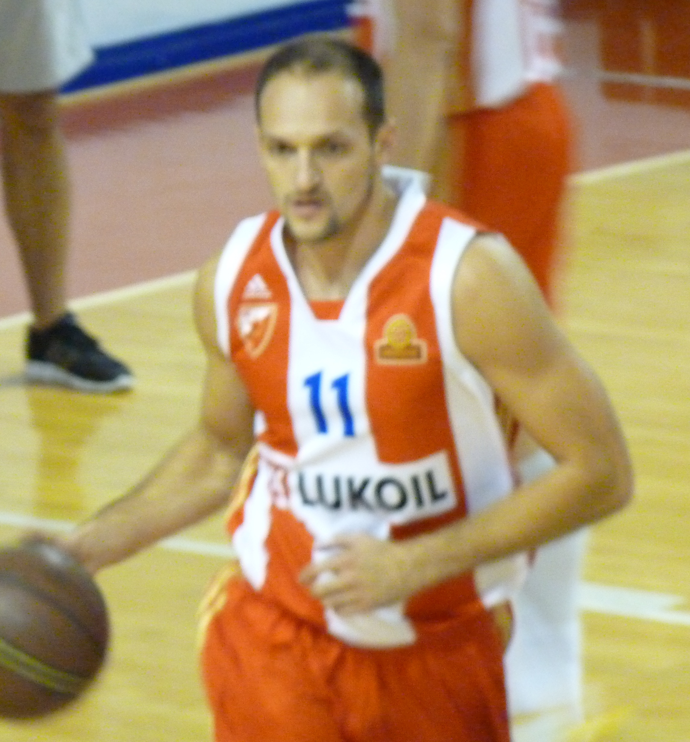 Игор Ракочевић